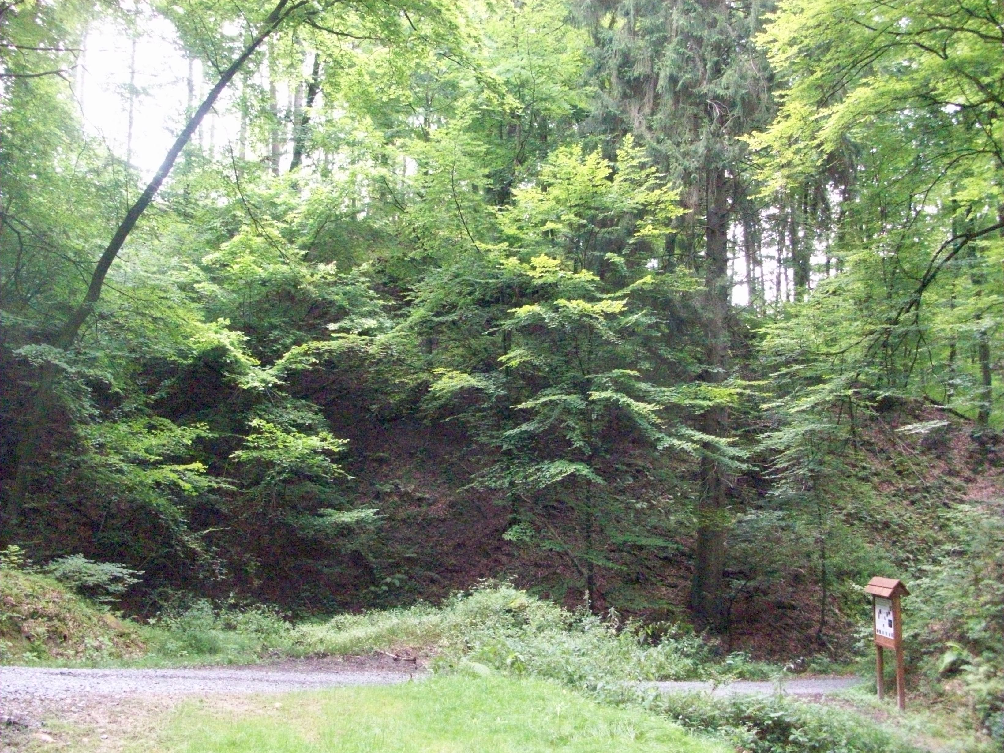 Steile Nordflanke des Burgbergs